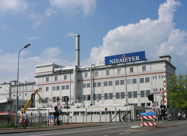 Fabriek van Koninklijke Theodorus Niemeyer BV te Groningen (Nederland), foto door Fruggo, 17 augustus 2004, CC-BY.